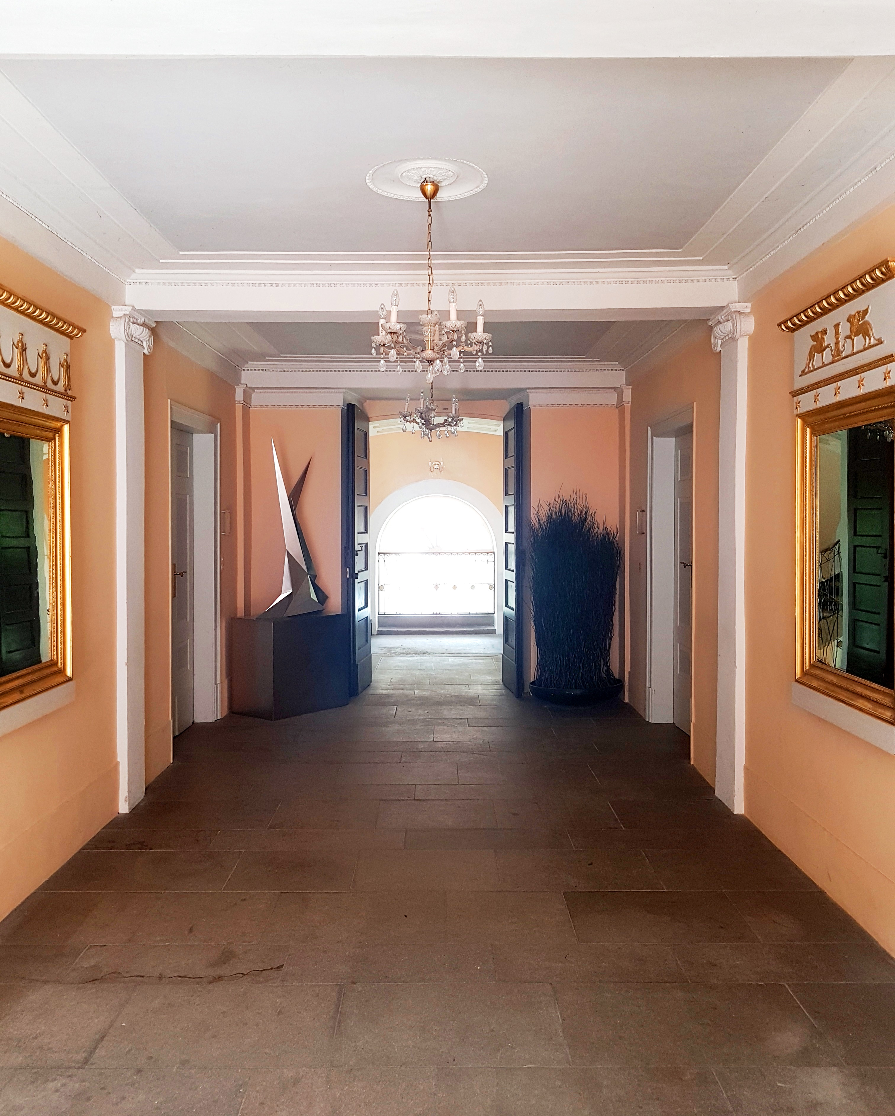 Eingangsbereich von Schloss Dätzingen